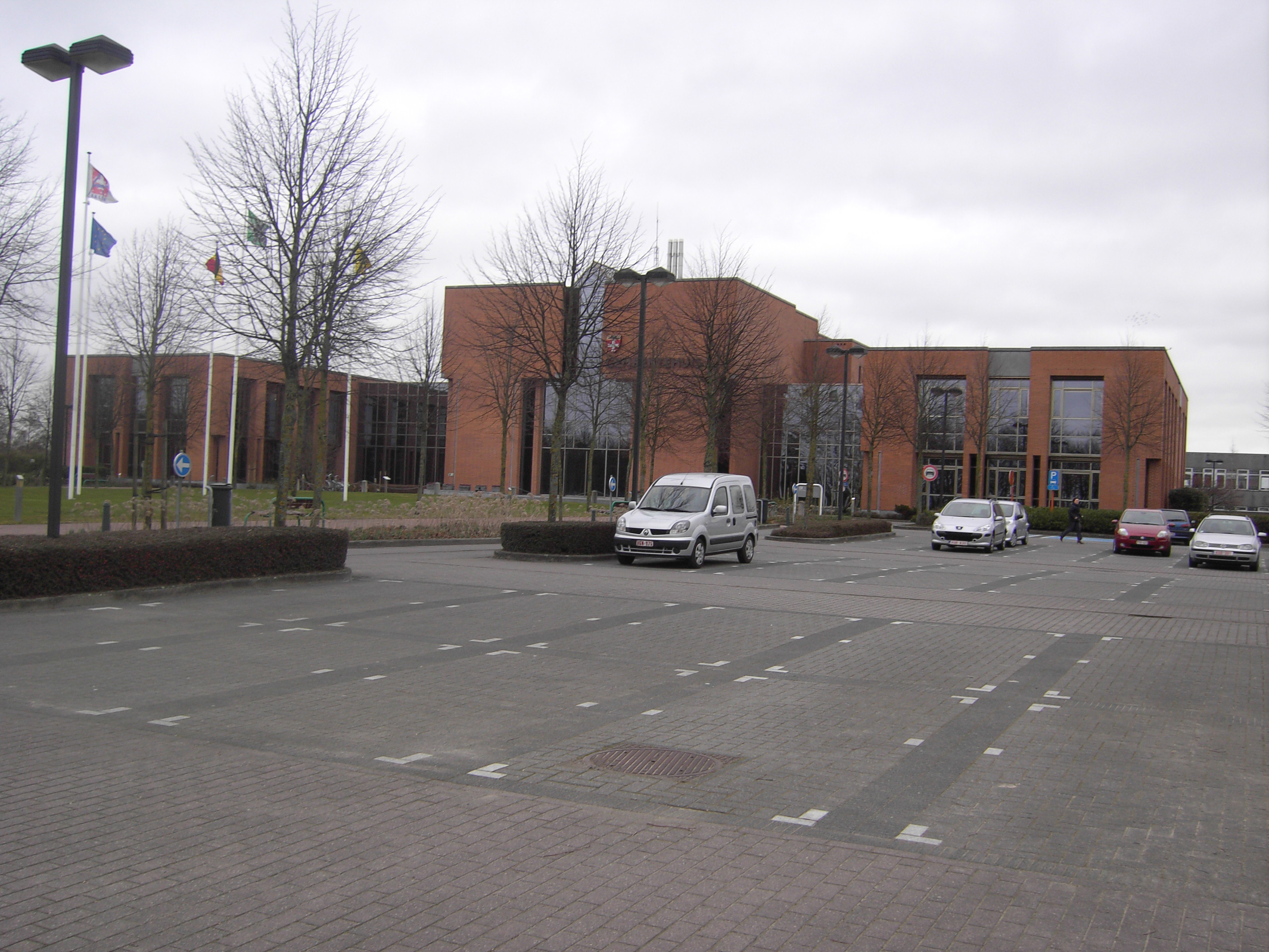 Gemeentehuis - in de volksmond het Cremlin, verwijzend naar burgemeester Pieter De Crem - Aalter - Oost-Vlaanderen - België.